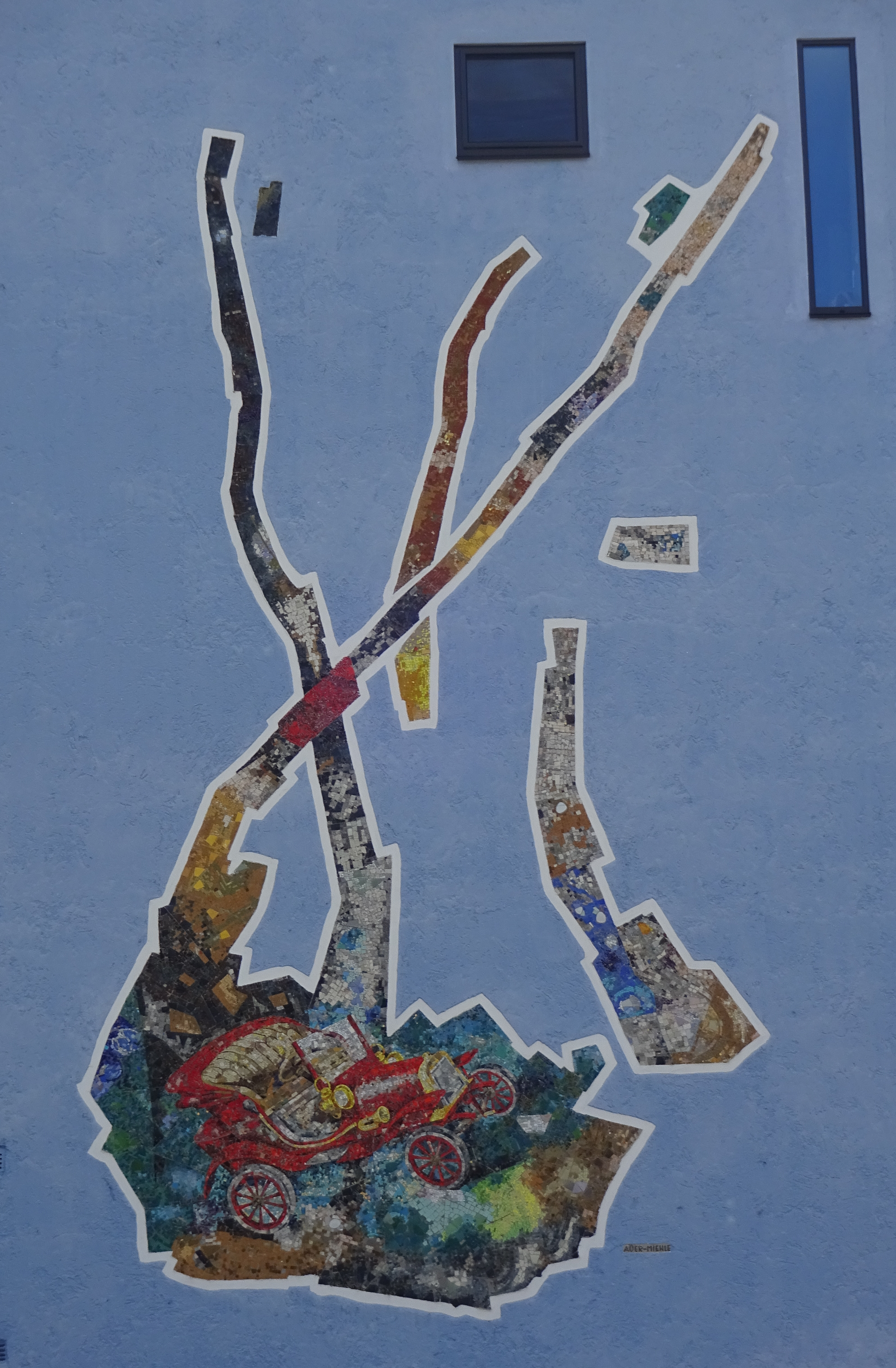 Innsbruck, Wandbild am Haus Zeughausgasse 3 (Rindfleisch Reisen) von Friedel Auer-Miehle (1914–2004)